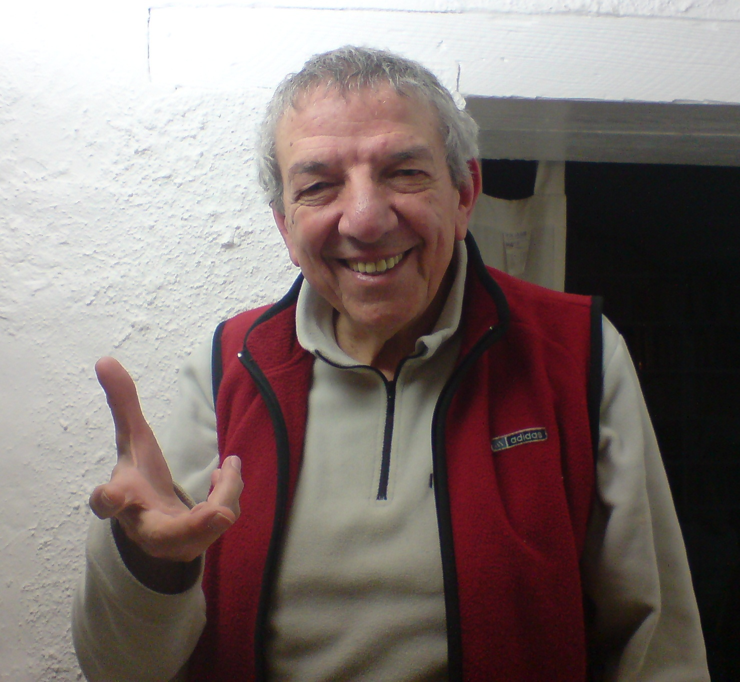 Ciriani en su casa